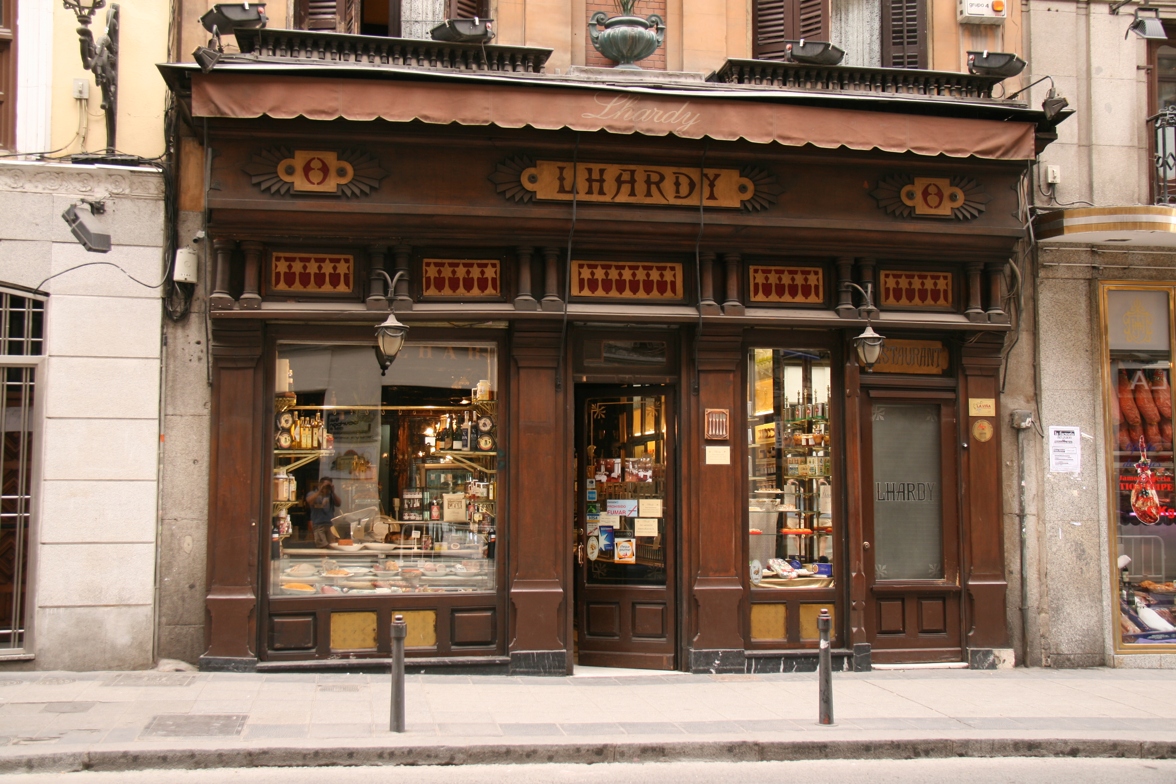 Portada del Restaurante Lhardy en Madrid (Carrera de San Jerónimo)